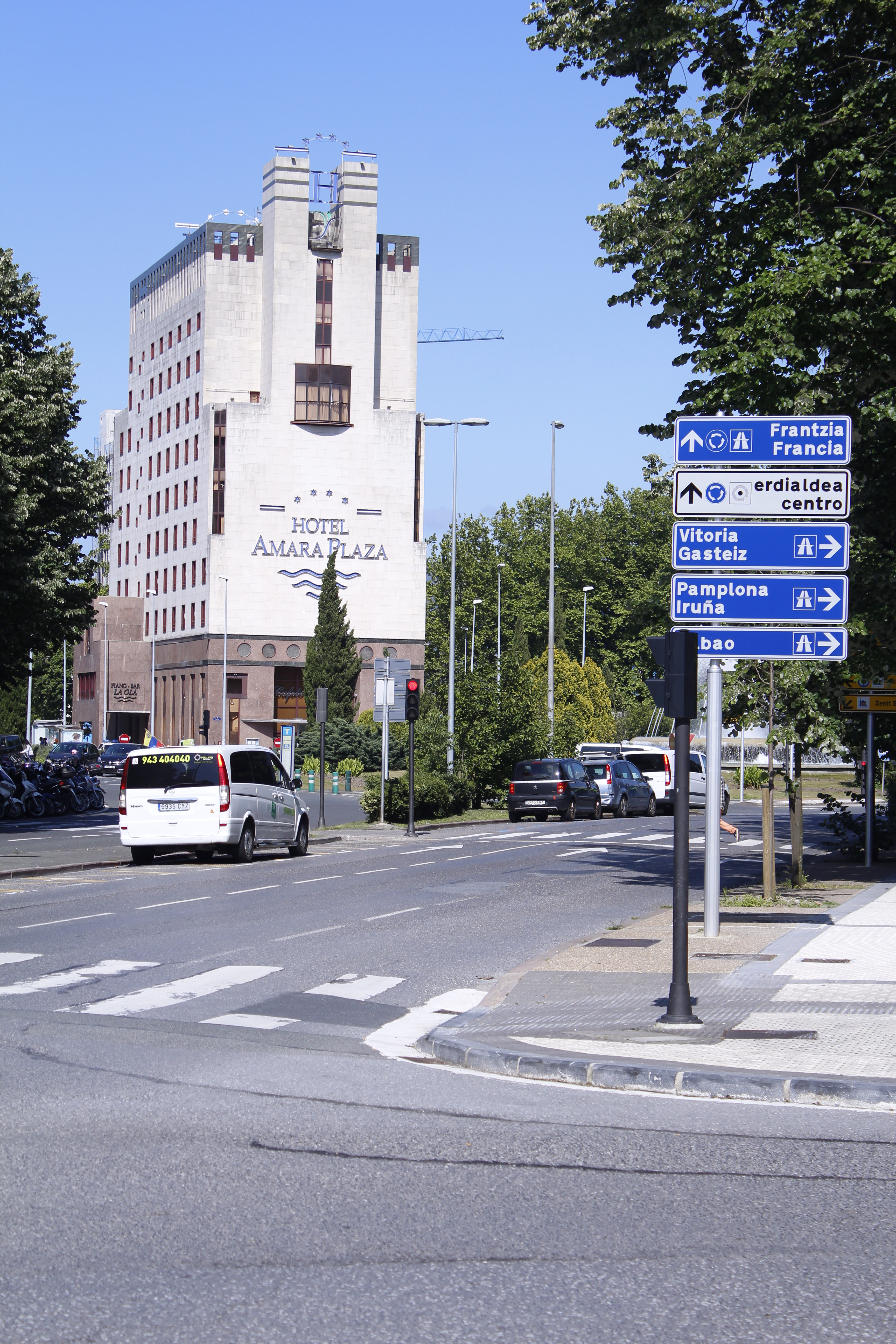 Amara Plaza hotelaren eraikina, Donostian, Amara auzoan